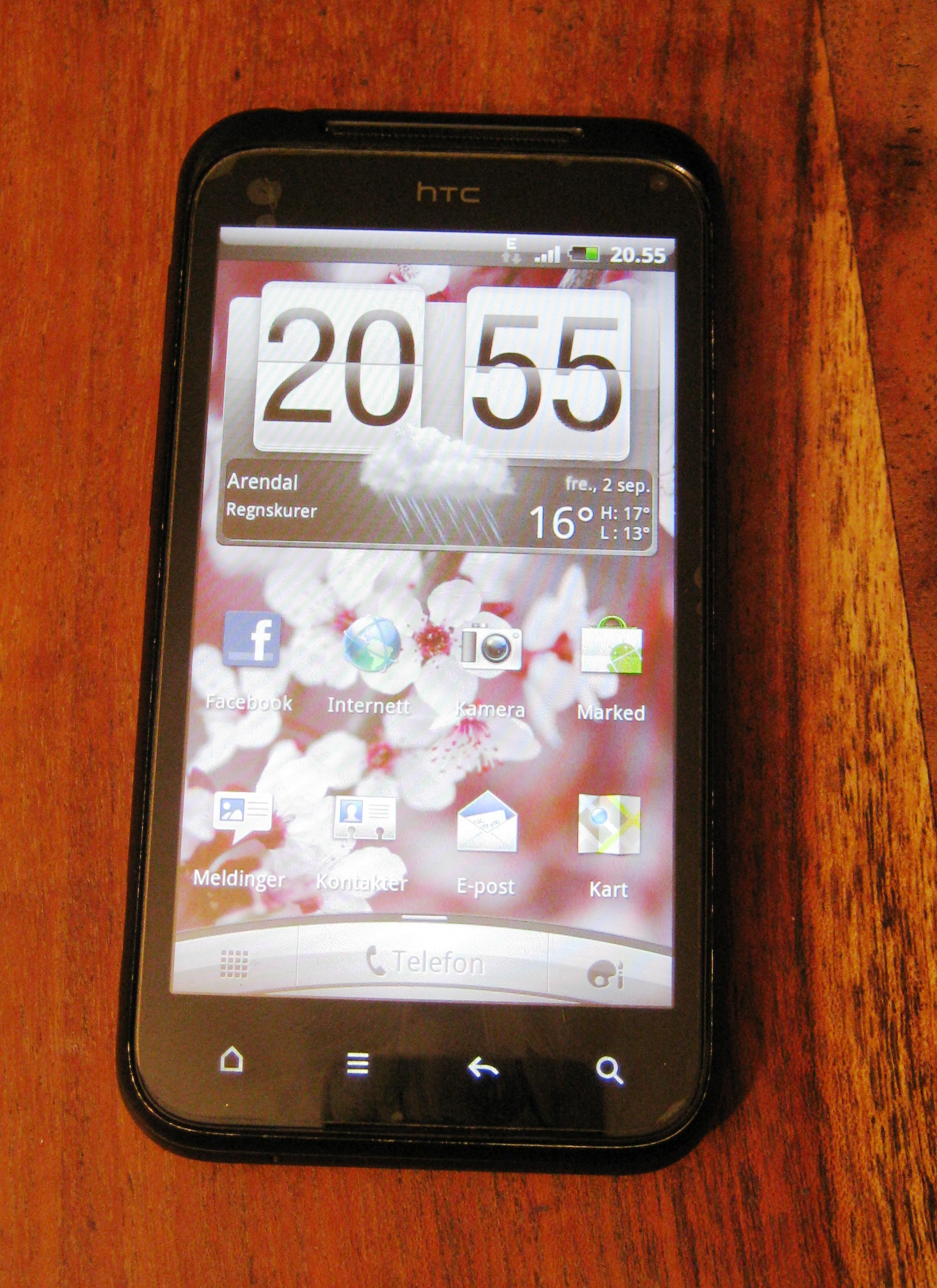 HTC Incredible S mobiltelefon